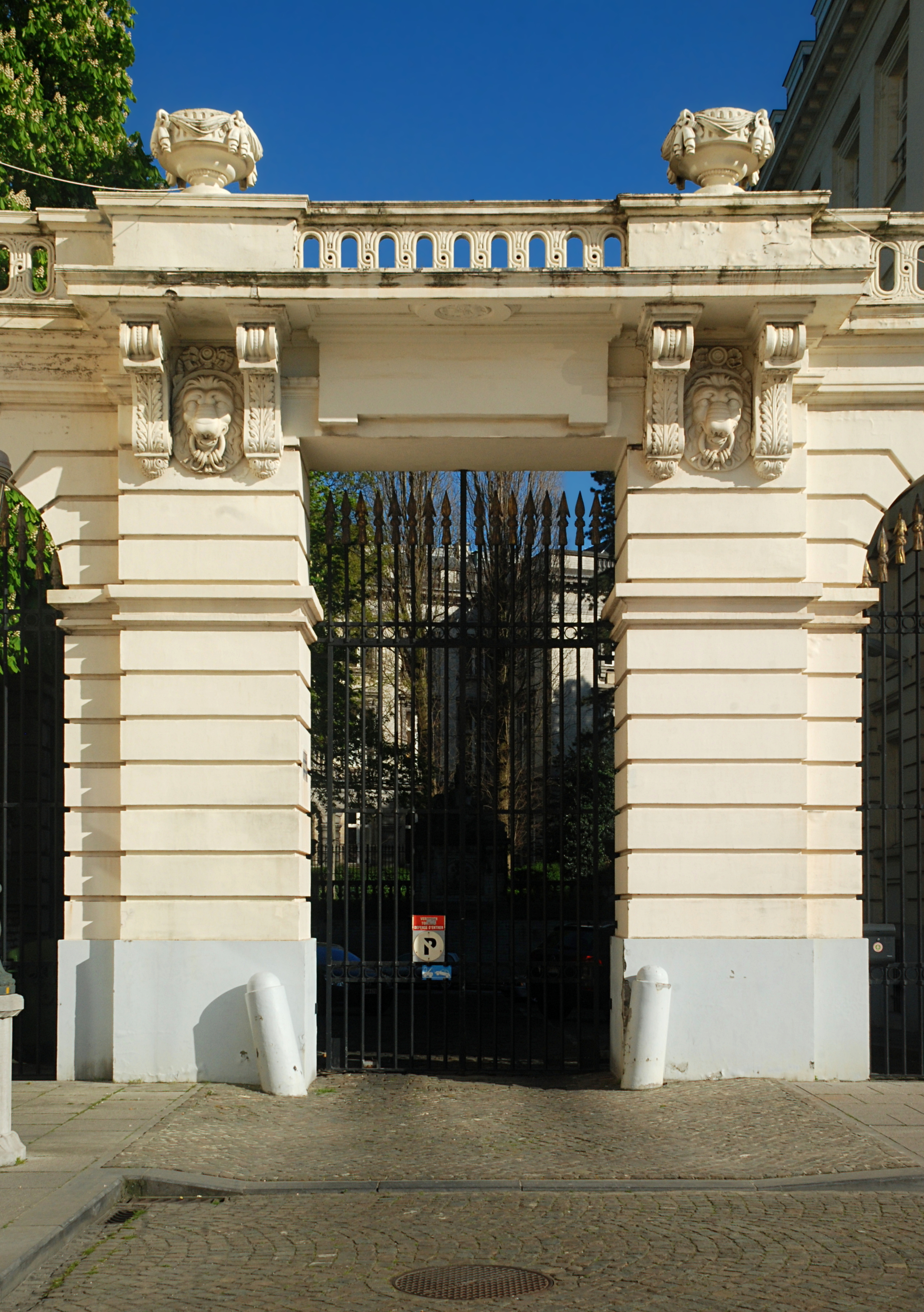 Belgique - Bruxelles - Place Royale - Portique du Borgendael